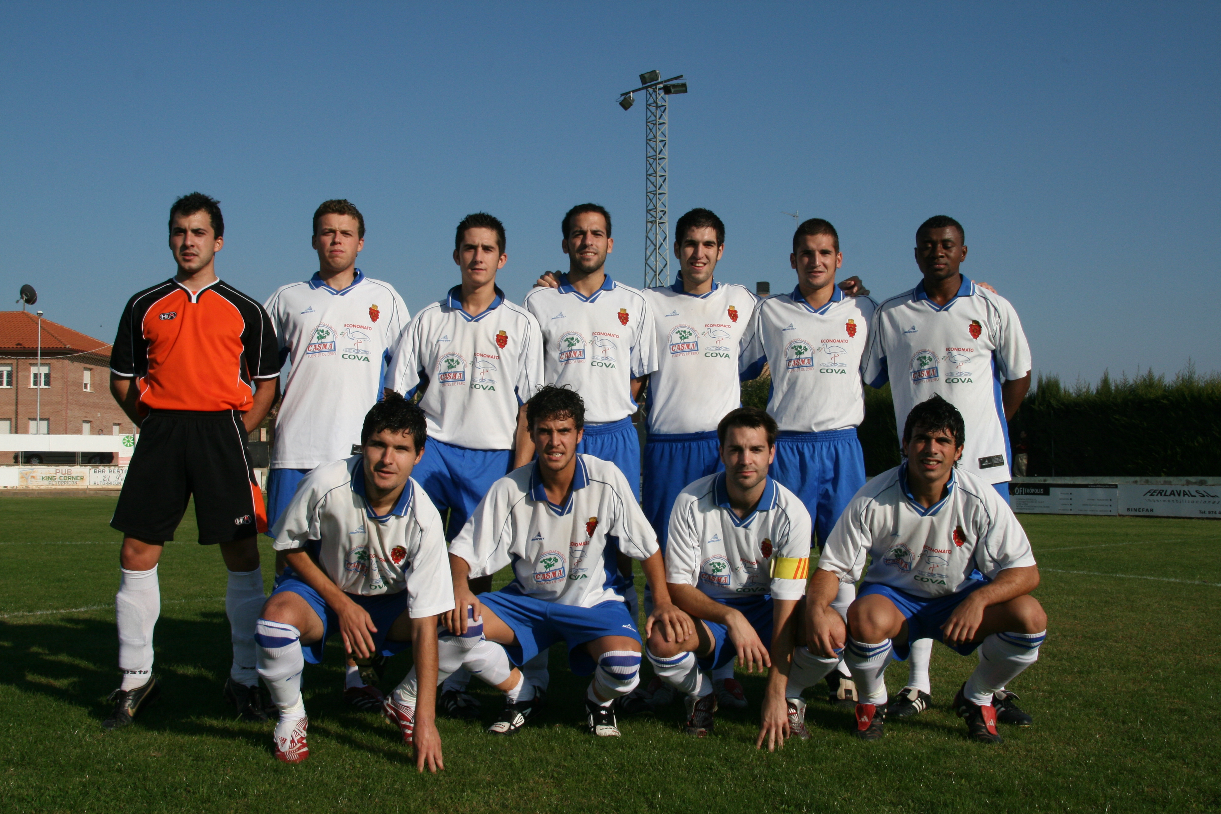 CD Fuentes